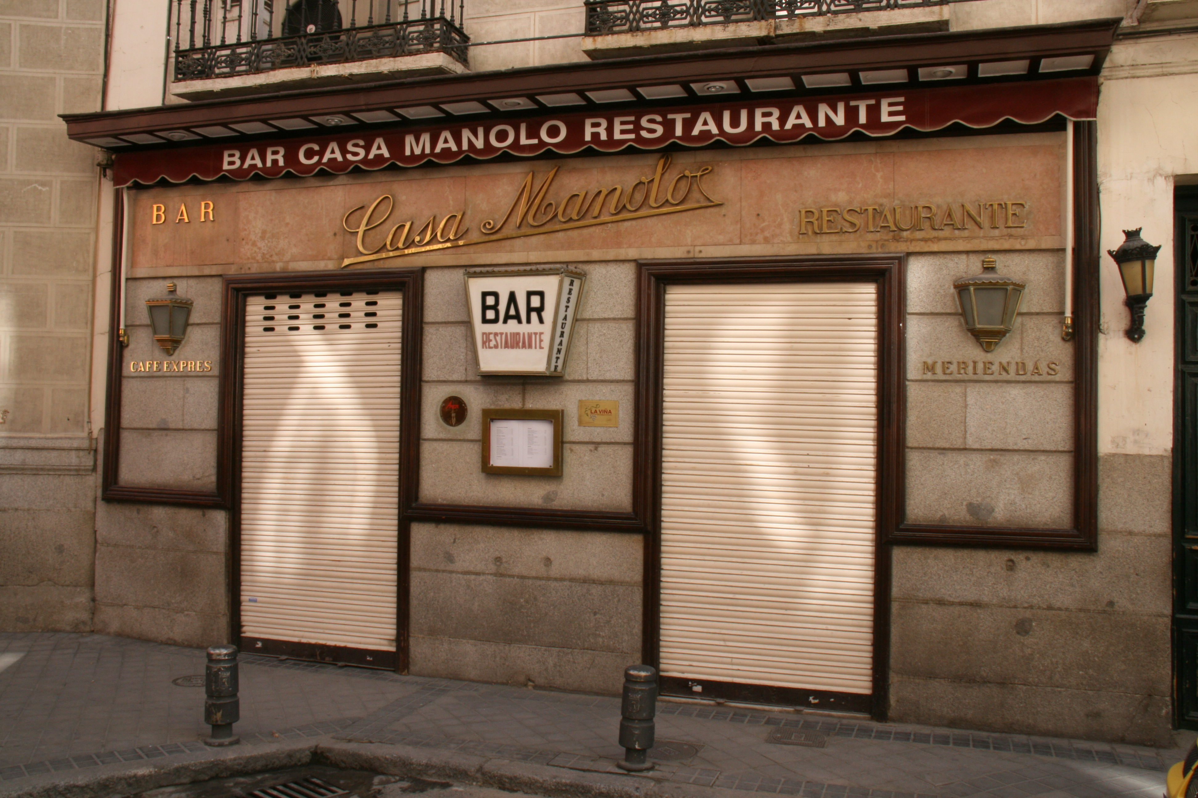 Restaurante casa Manolo - Jovellanos 7